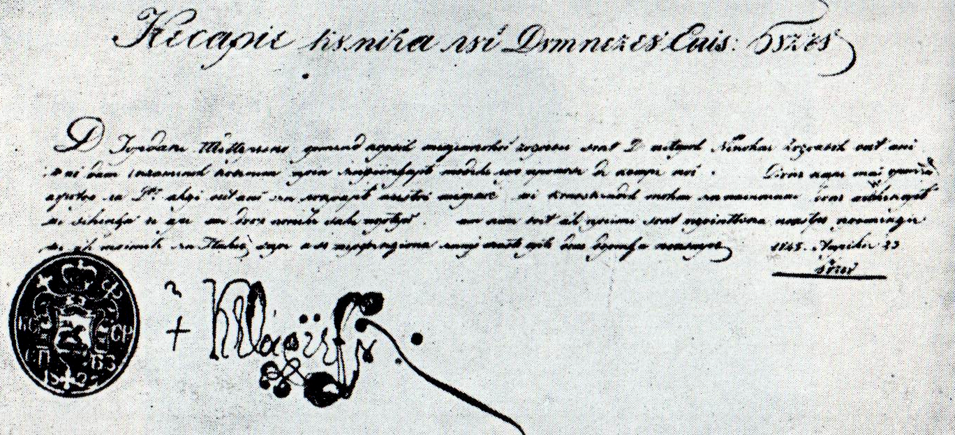 Certificat de studii eliberat de Episcopul Chesarie al Buzăului pictorului Tattarescu, în ajunul plecării în Italia, manuscris aflat la Academia Română.